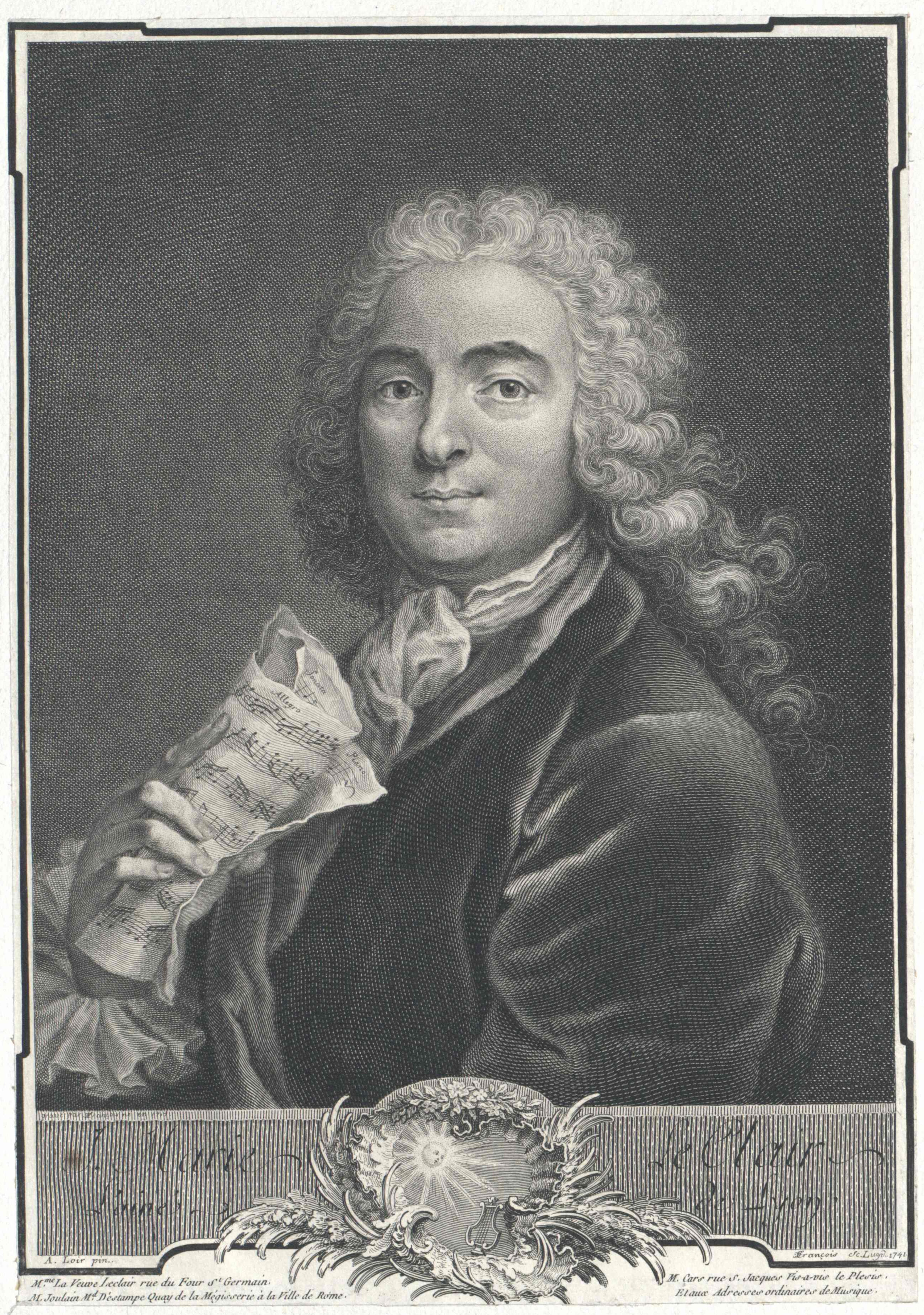 Jean Marie Leclair, Kupferstich von J.Ch. François.